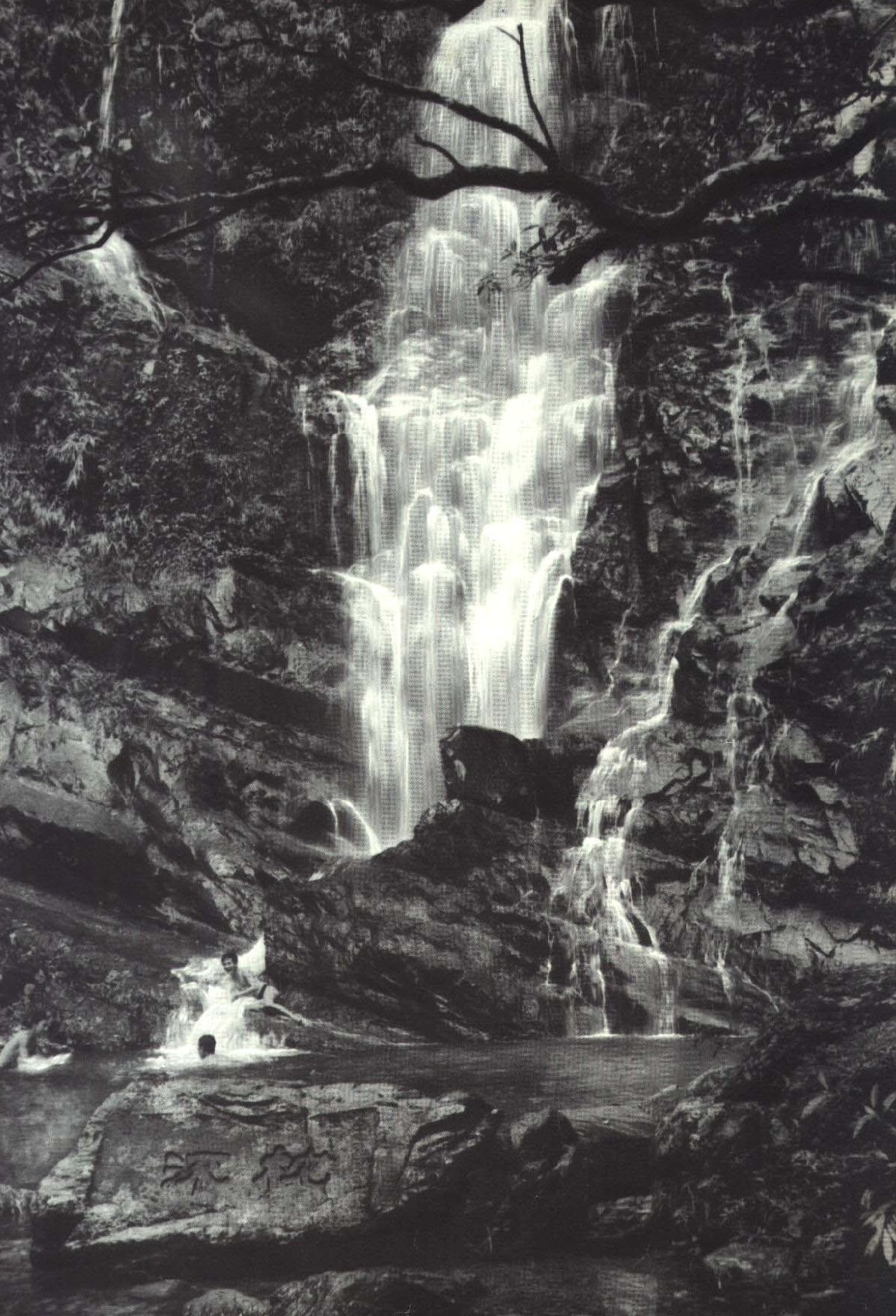 1964-09 1964年 广东鼎湖瀑布